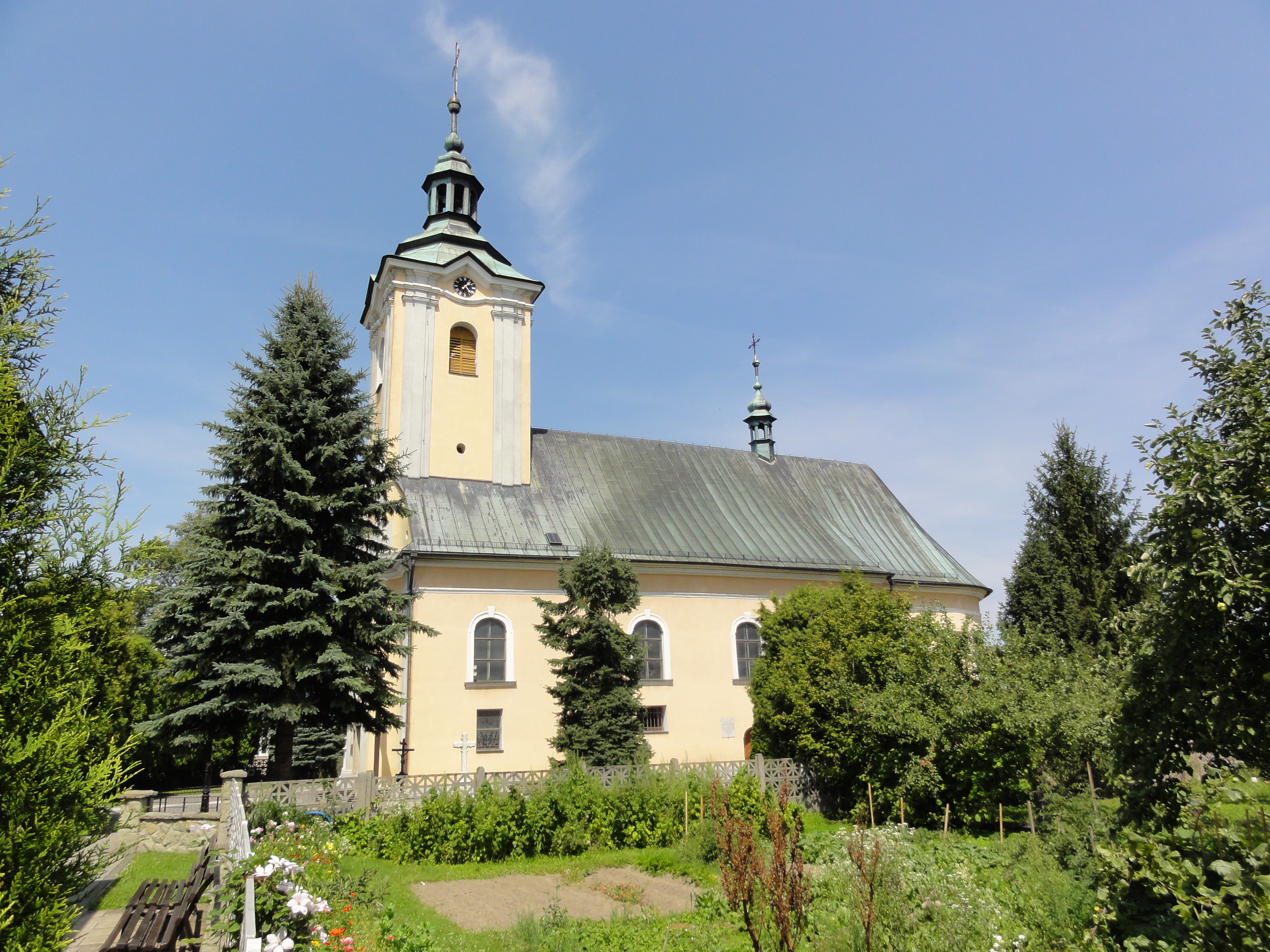 Kościół Opatrzności Bożej w Ligocie